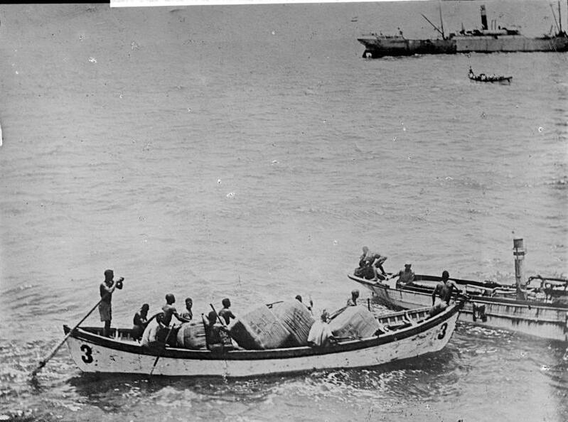 Togo, Lome, Verladen von Baumwollballen Baumwollballen werden auf der Rheede von Lome verladen. Afrika-Togo